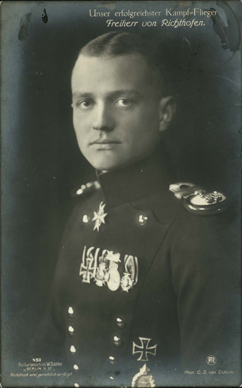 Manfred von Richthofen from Sanke card #450. The caption is Unser erfolgreichster Kampf-Flieger: Freiherr von Richthofen, which means "Our most successful fighter pilot: Baron von Richthofen".